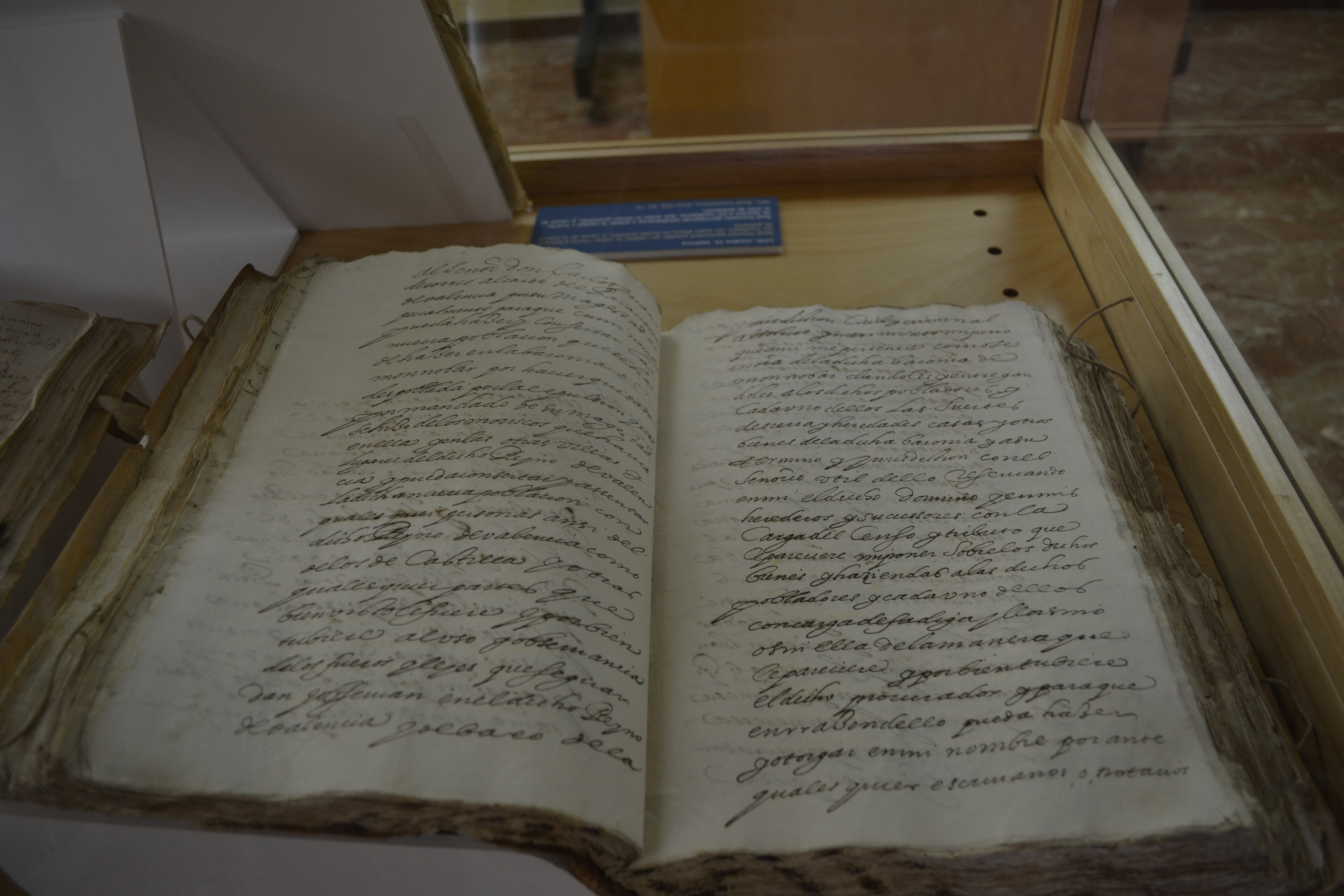 N'Ana de Portugal i Borja atorga poders a en Carles Juan de Torres per a poblar la vila de Monòver, despoblada per l'expulsió dels moriscos, a fur de València. ARV. Manaments i Empars, any 1611, llibre 8, mà 75, fol. 22 (cópia de 6 de setembre de 1611). Arxiu del Regne de València .